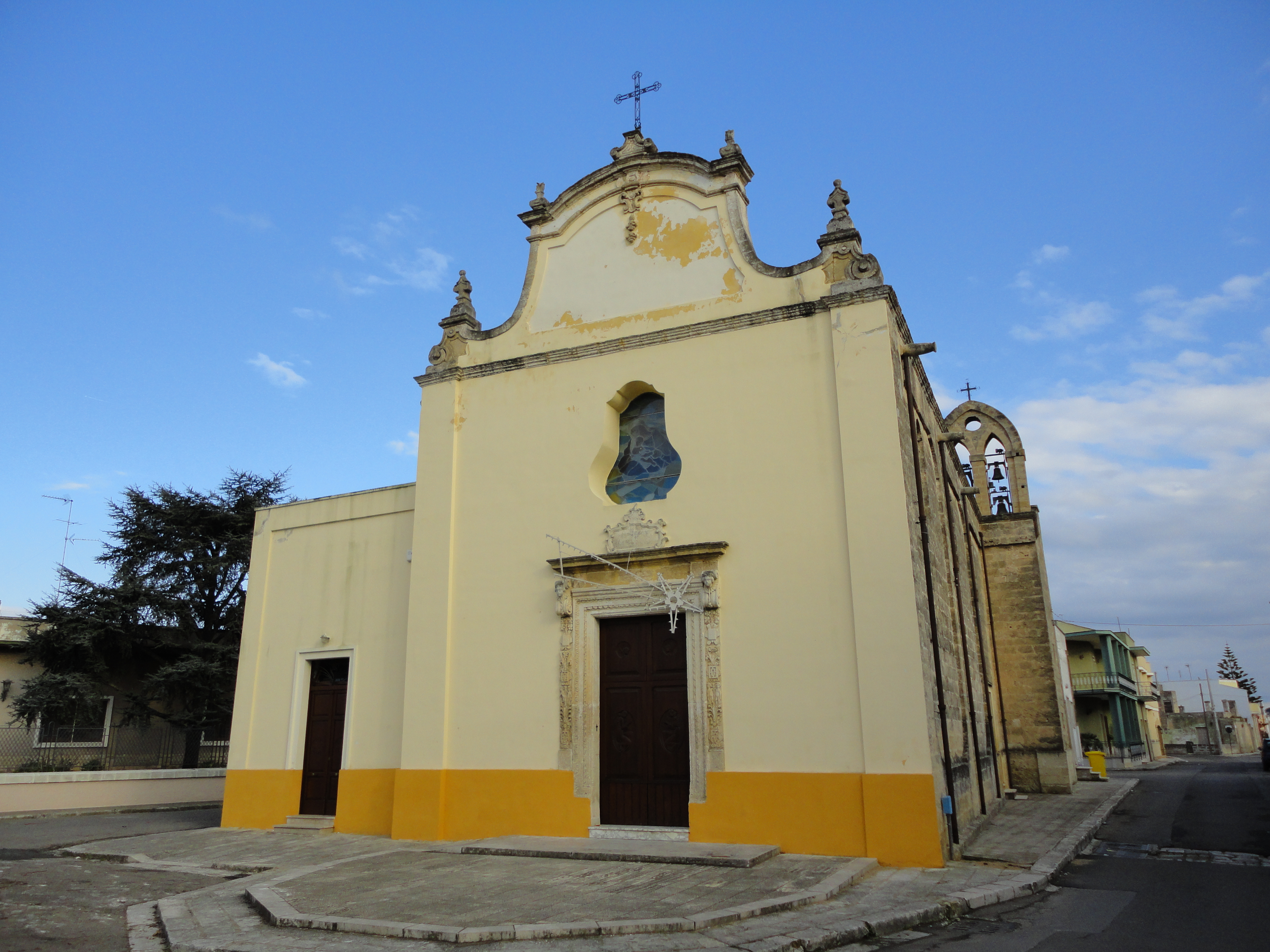 Chiesa Mater Domini Squinzano, Lecce